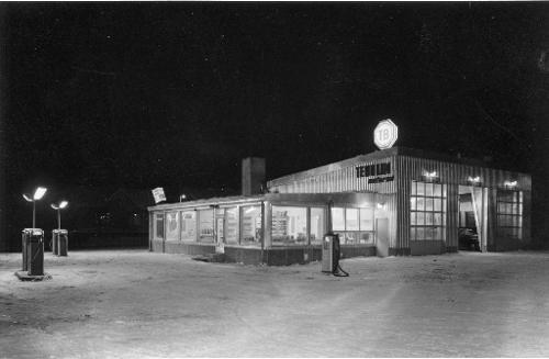 Viinikan TB-huoltoasema Tampereella 1960-luvun alkupuolella